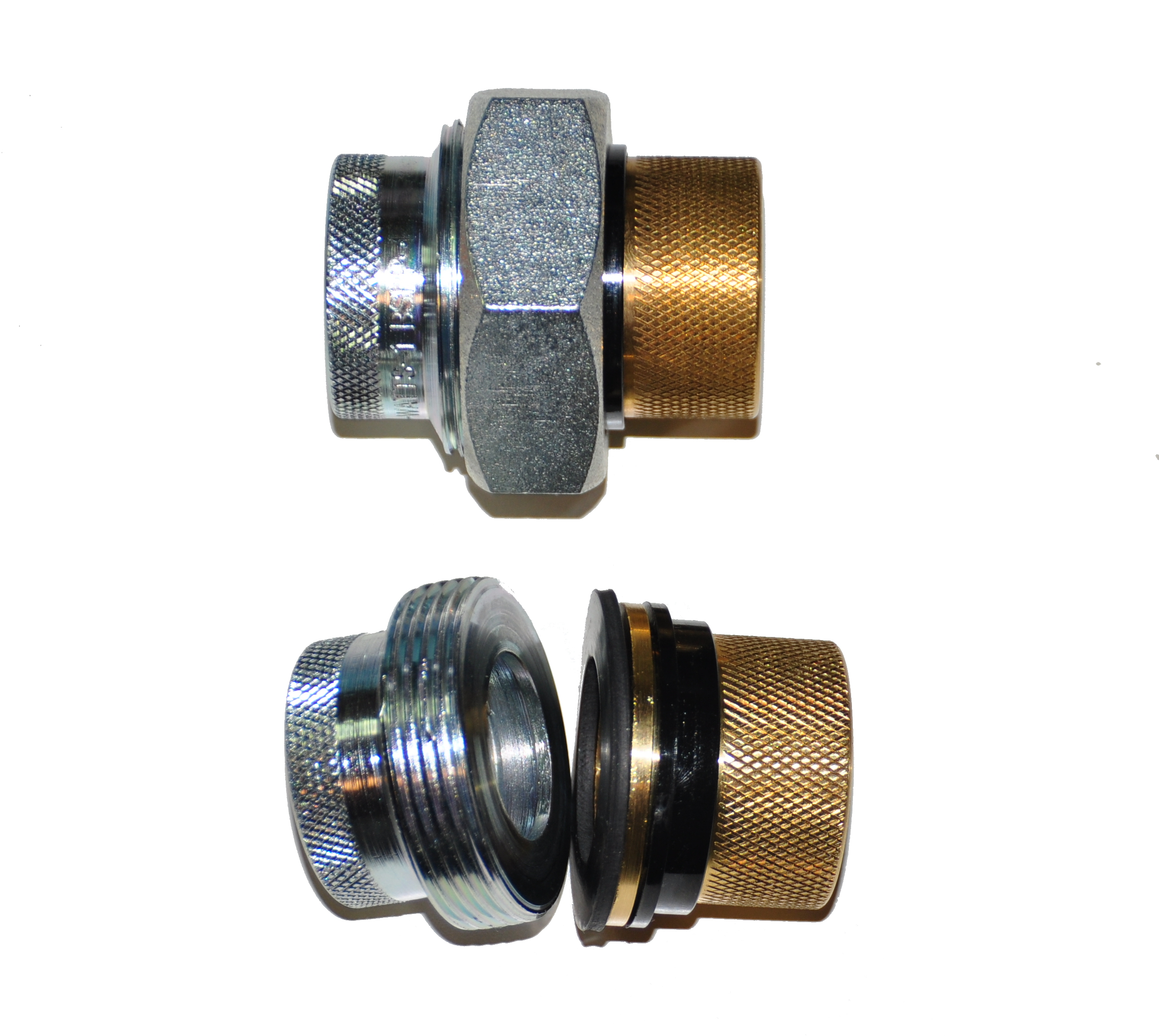 Galvanische Trennfittings Stahl auf Messing